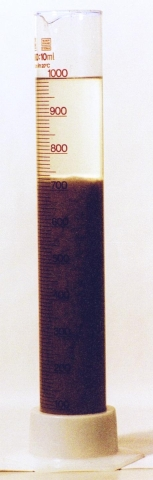 Separation im Verband von Schlamm in einem Standzylinder.